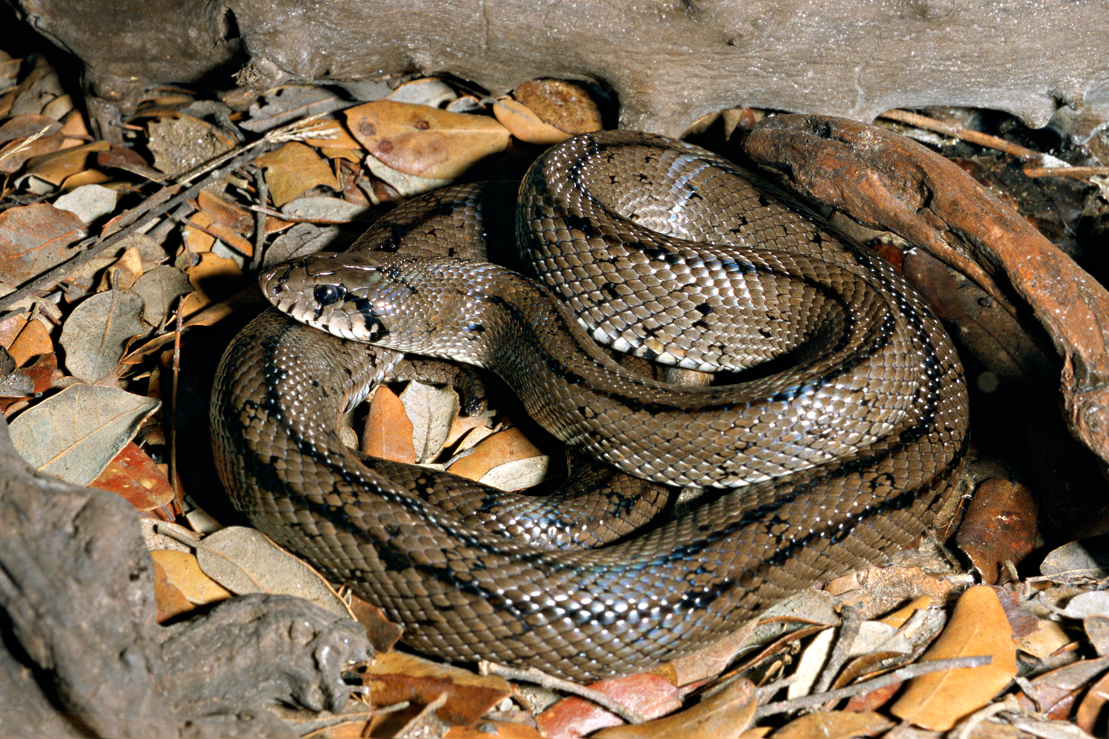 Culebra de escalera